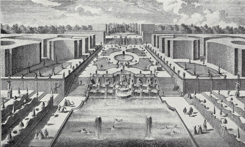 "Perspectivischer Auffzug unterschiedlicher Cascaden und Fontainen, hauptsächlich aber die Fontaine Neptuni vorstellend" - Mittlere Gartenanlage der Favorite nach einem Stich von Salomon Kleiner, 1726